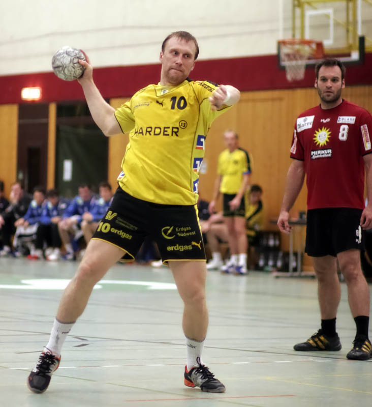 Oleg Velyky, on November 28th 2006 in the Weststadt Hall in Bensheim (Germany), during the game Rhein Neckar Löwen - TuS Nettelstedt-Lübbecke performing a 7m penalty shot.